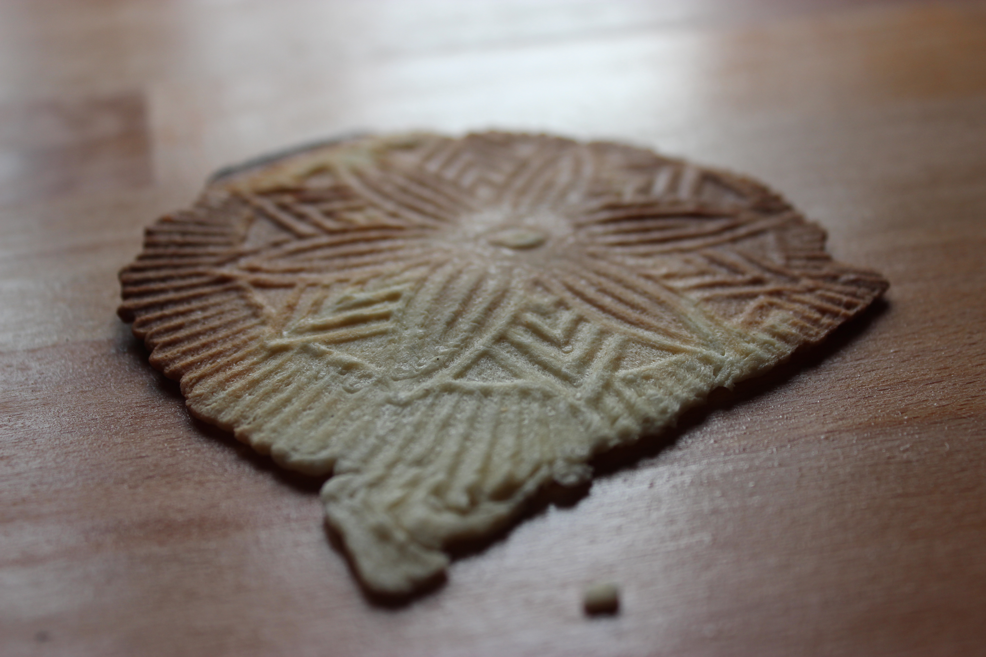 Cène, patisserie moulée (type gauffre) du pays de Saint-Léonard-de-Noblat